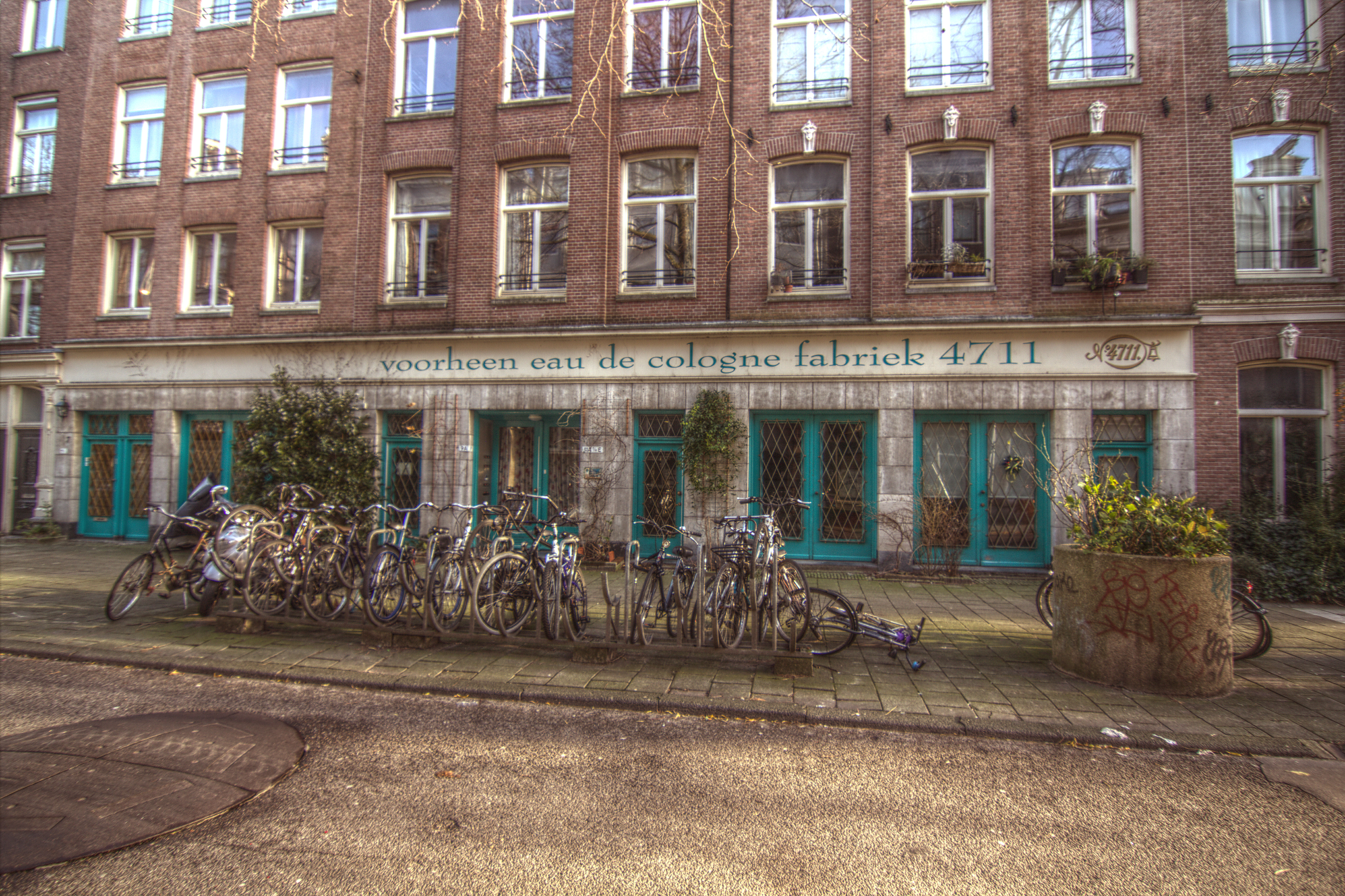 De voormalige eau de colognefabriek in de Frans Halsstraat in Amsterdam